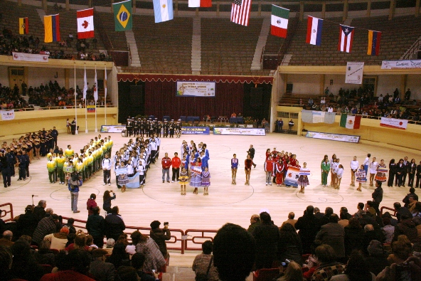 Esta noche quedó inaugurado Campeonato Sudamericano de Patinaje Artístico